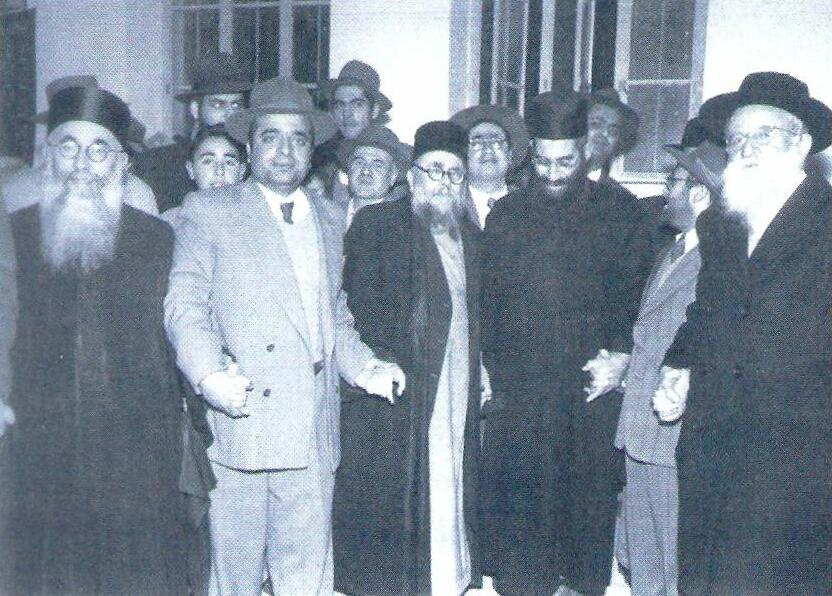 צילום מעיתון למעלה מחמישים שנה. משמאל לימין: הרב יעקב עדס, הרב בן ציון אבא שאול, הרב עזרא עטייה, הרב מנצור בן שמעון